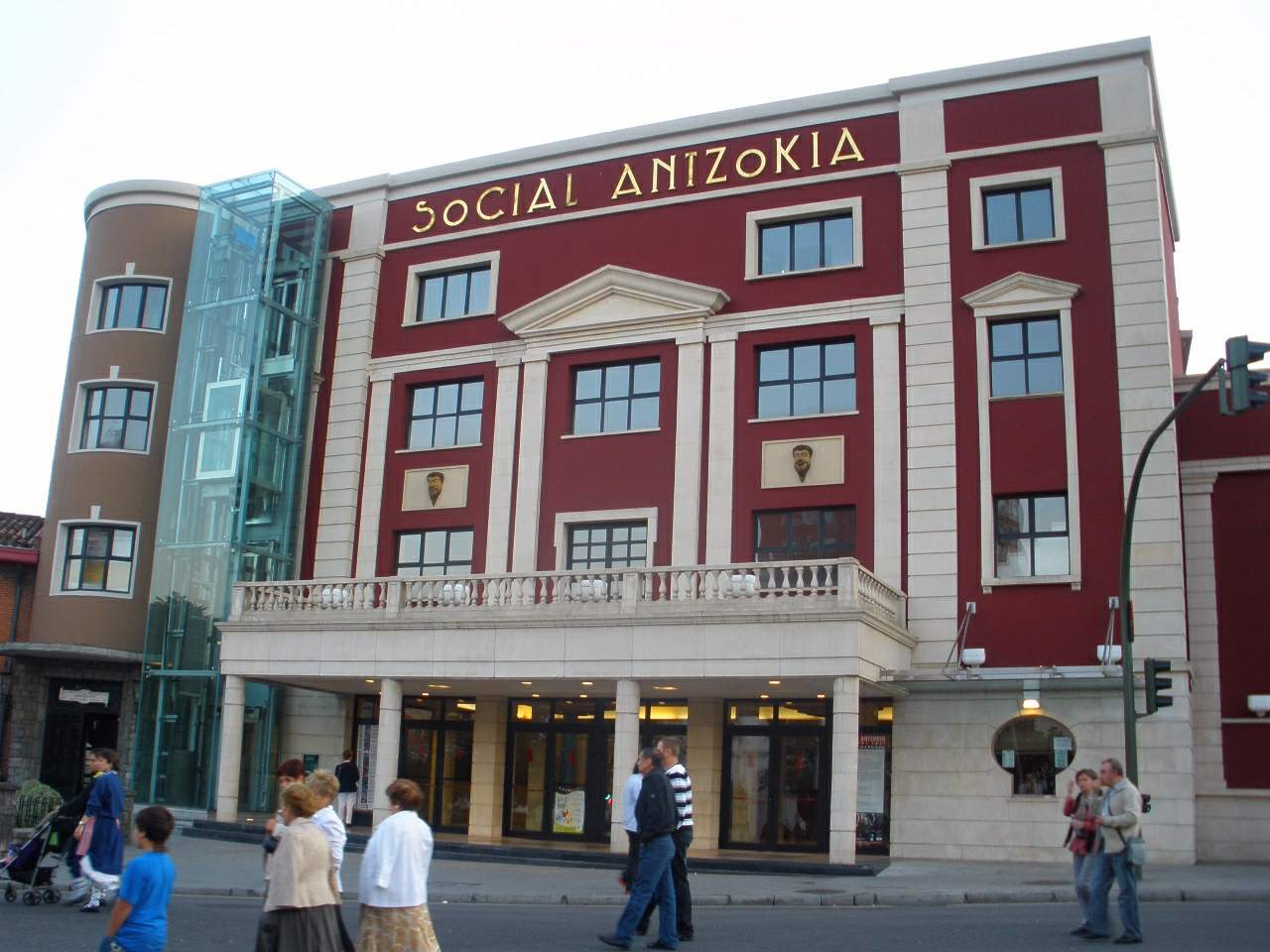 Basauri (Vizcaya)